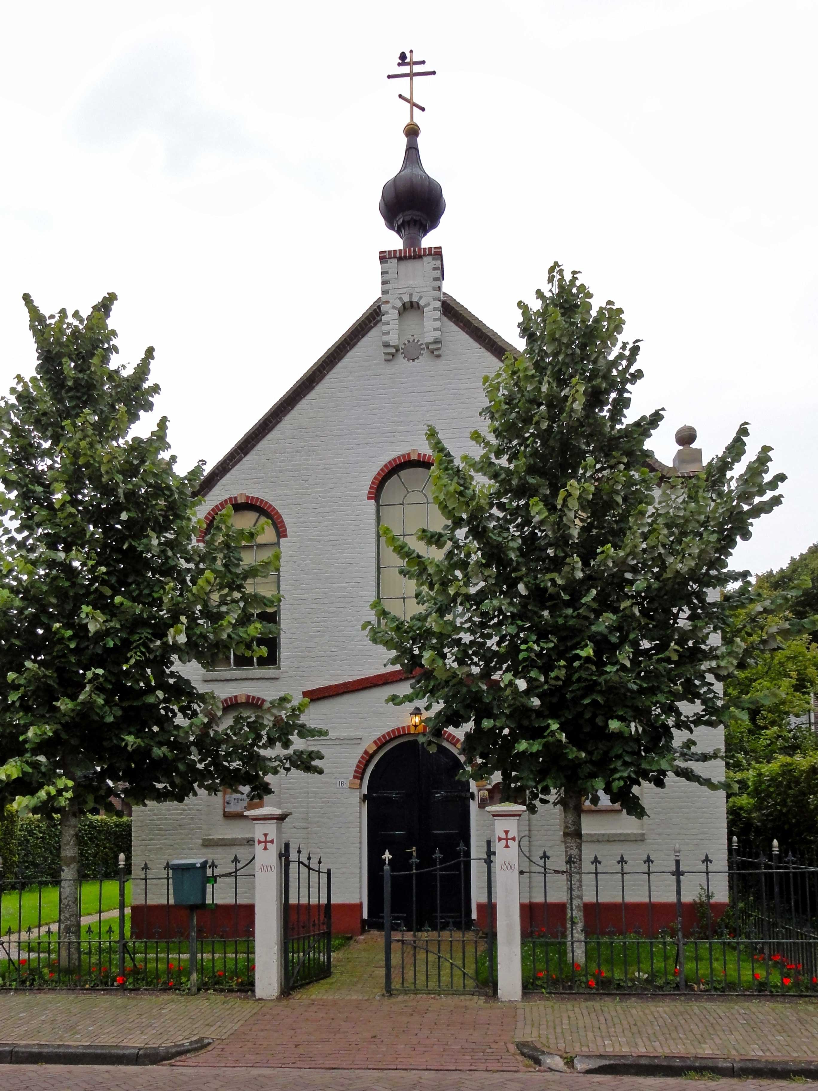 Het Russisch-orthodoxe klooster van de Heilige Nicolaas van Myra te Hemelum (exterieur)